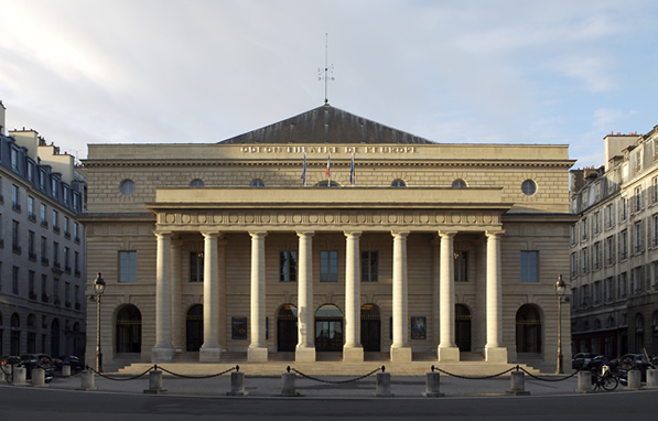 Werk von Charles De Wailly